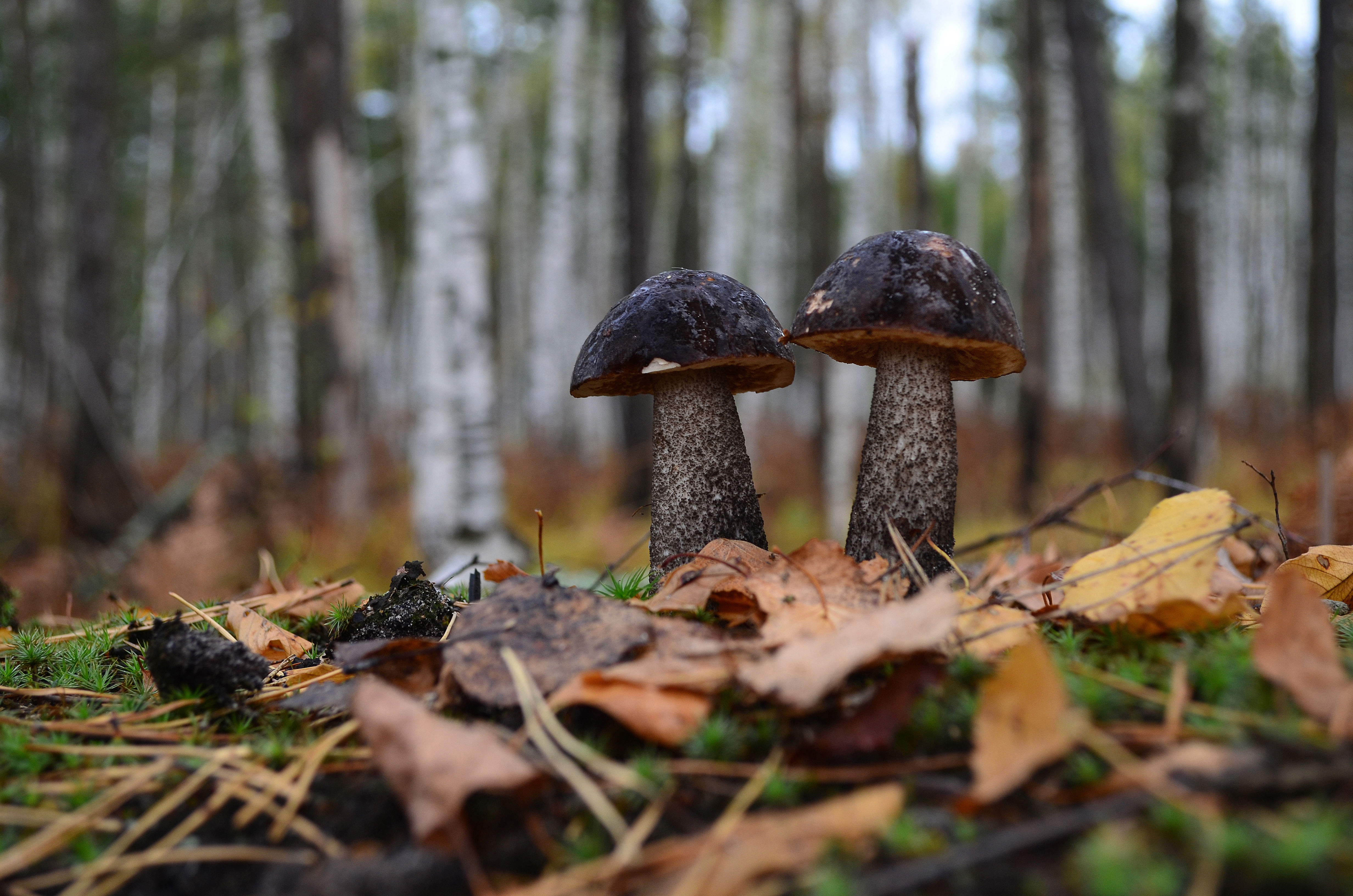 Рязанская область.Подберёзовики.